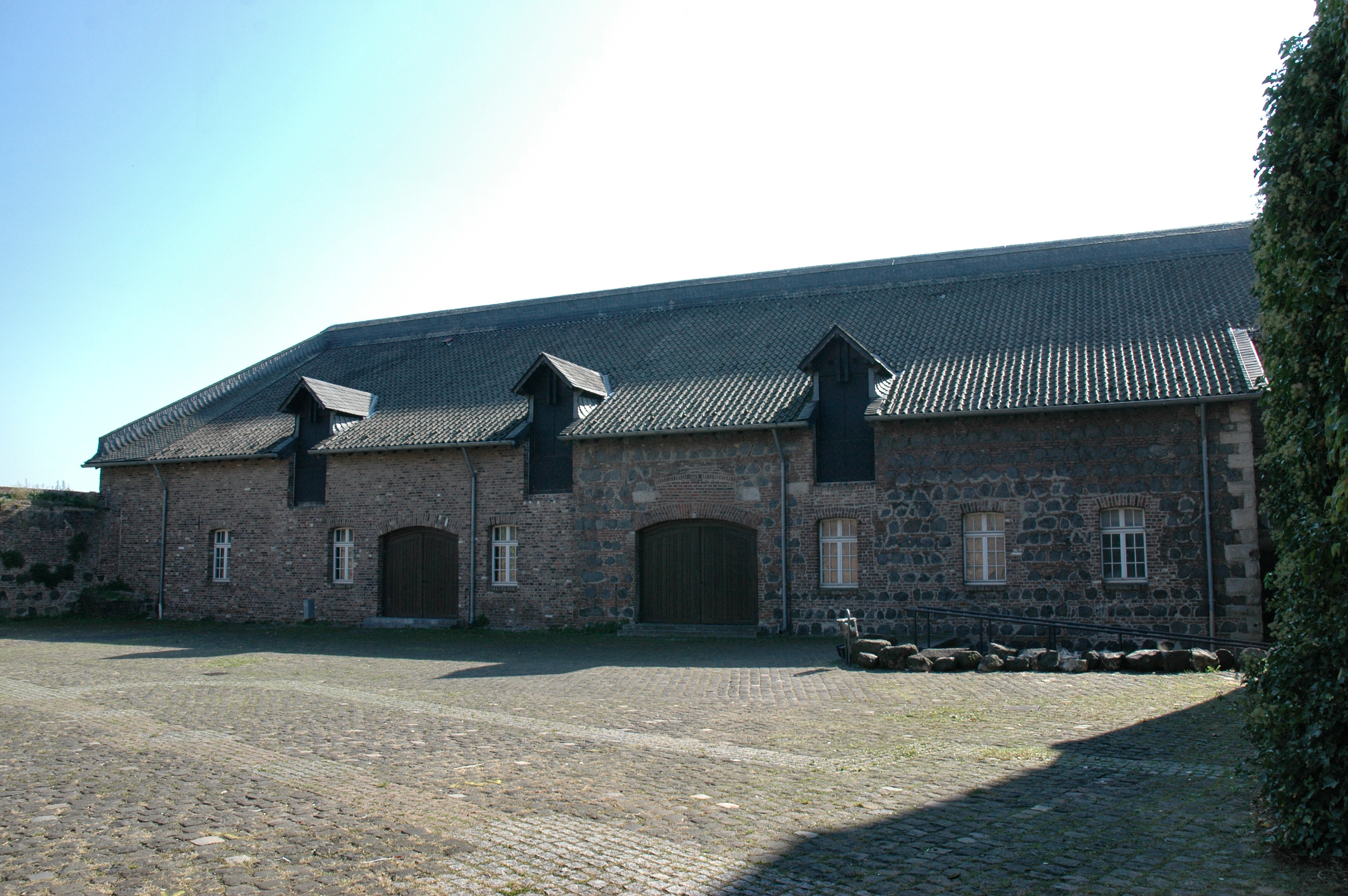 Burg Friedestrom in Dormagen-Zons, Südflügel der Kerburg